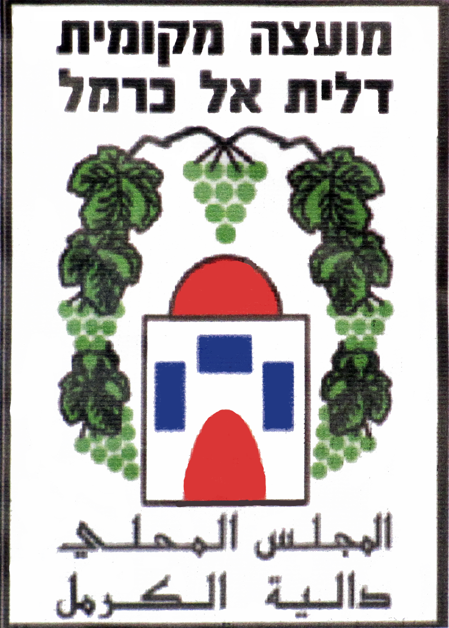 סמל רשות המקומית הישן של דלית אל כרמל. היה בשימוש מ- 1966 ועד 2013.